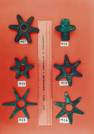 Distintas Cabezas